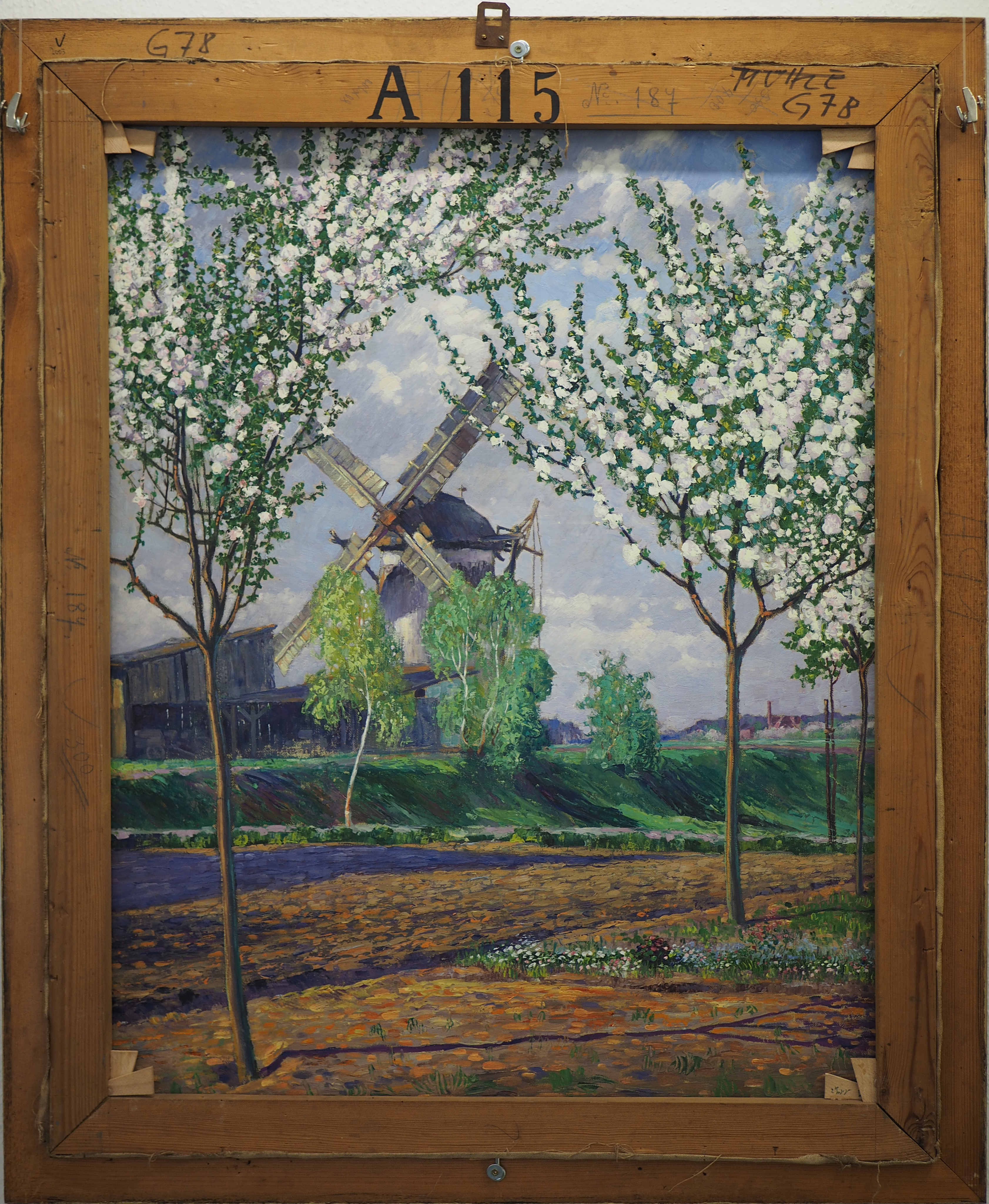 Rückseite des Bildes „Lupinenstrauß“ (1927)